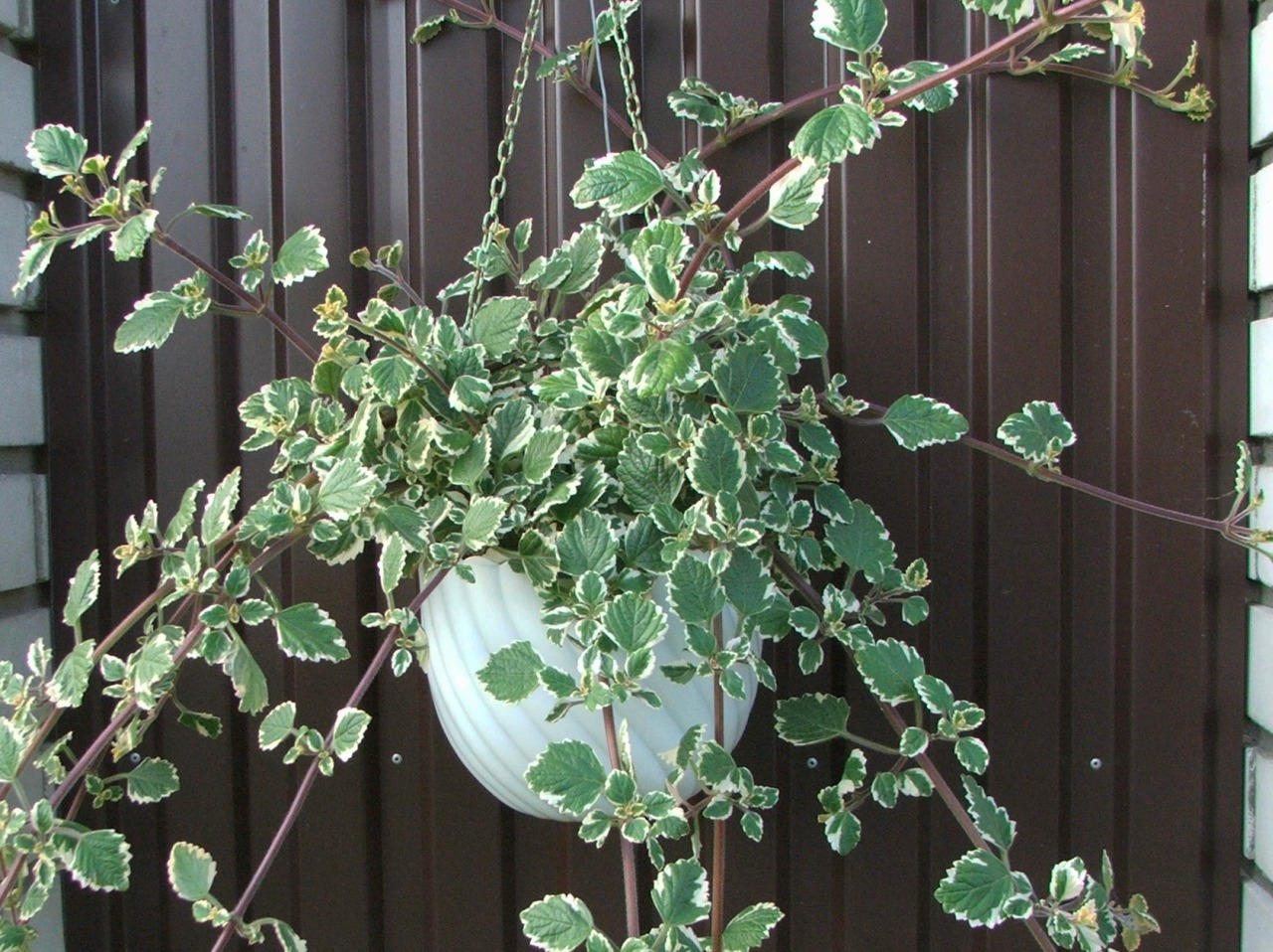 Plectranthus coleoides